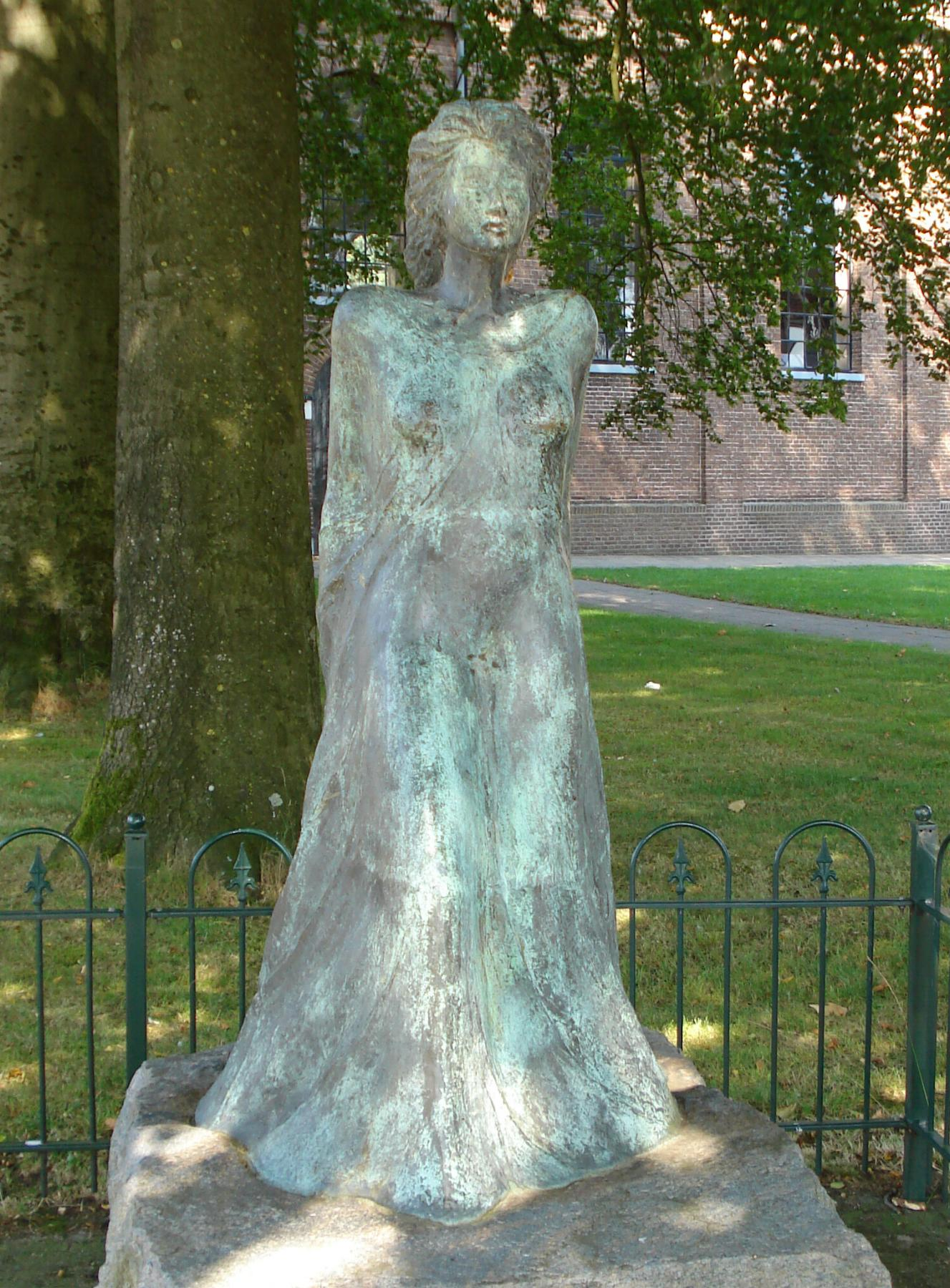 Hollandscheveld, gemeente Hoogeveen. Kunstwerk "Cilie de Nevelhekse" van Alice Top. Hoogeveen/The Netherlands.